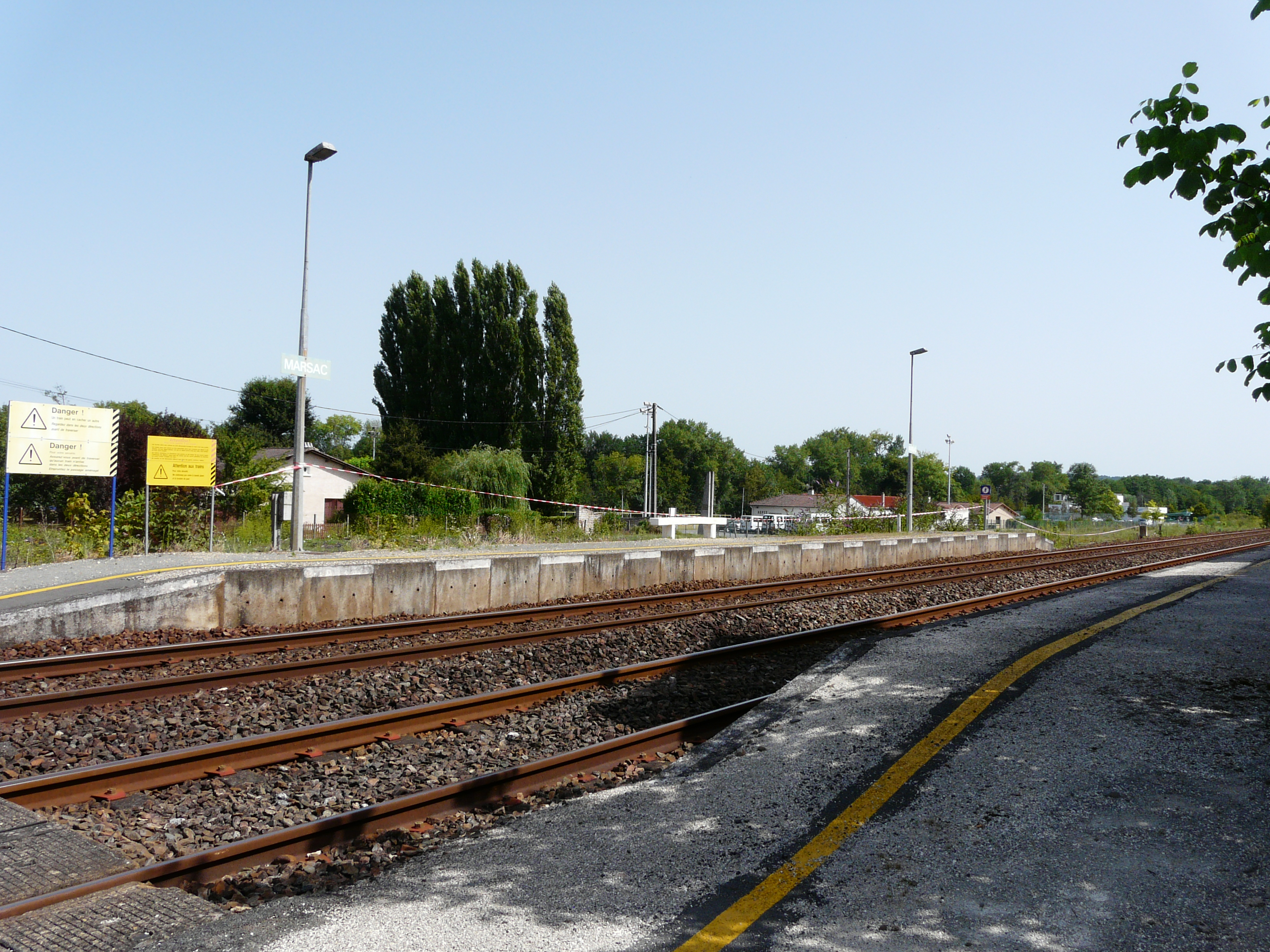 Les voies en gare de Marsac, Marsac-sur-l'Isle, Dordogne, France.